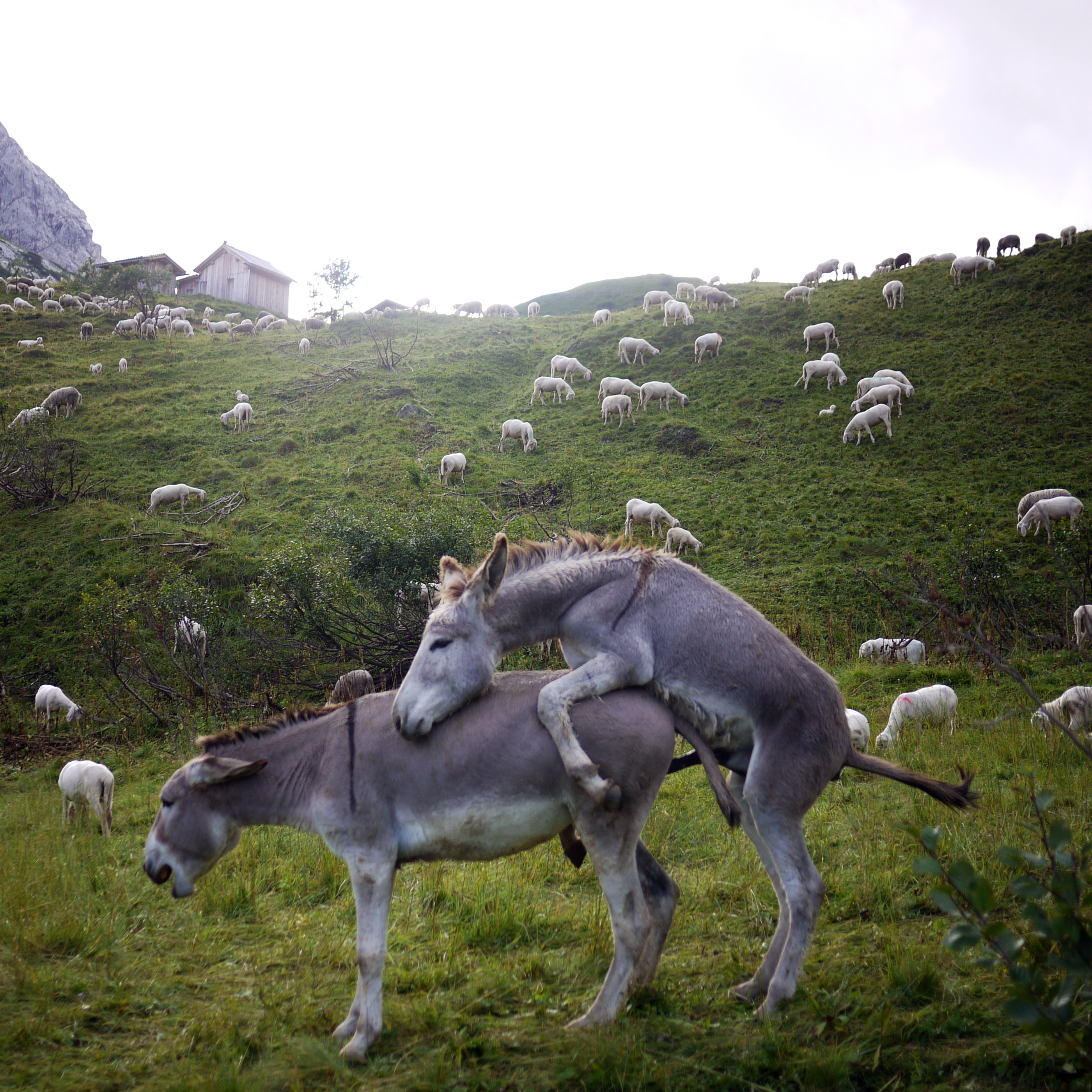 love